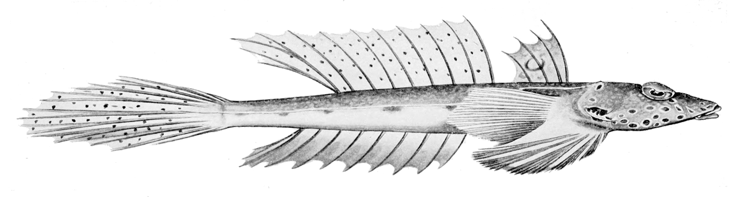 Repomucenus calcaratus